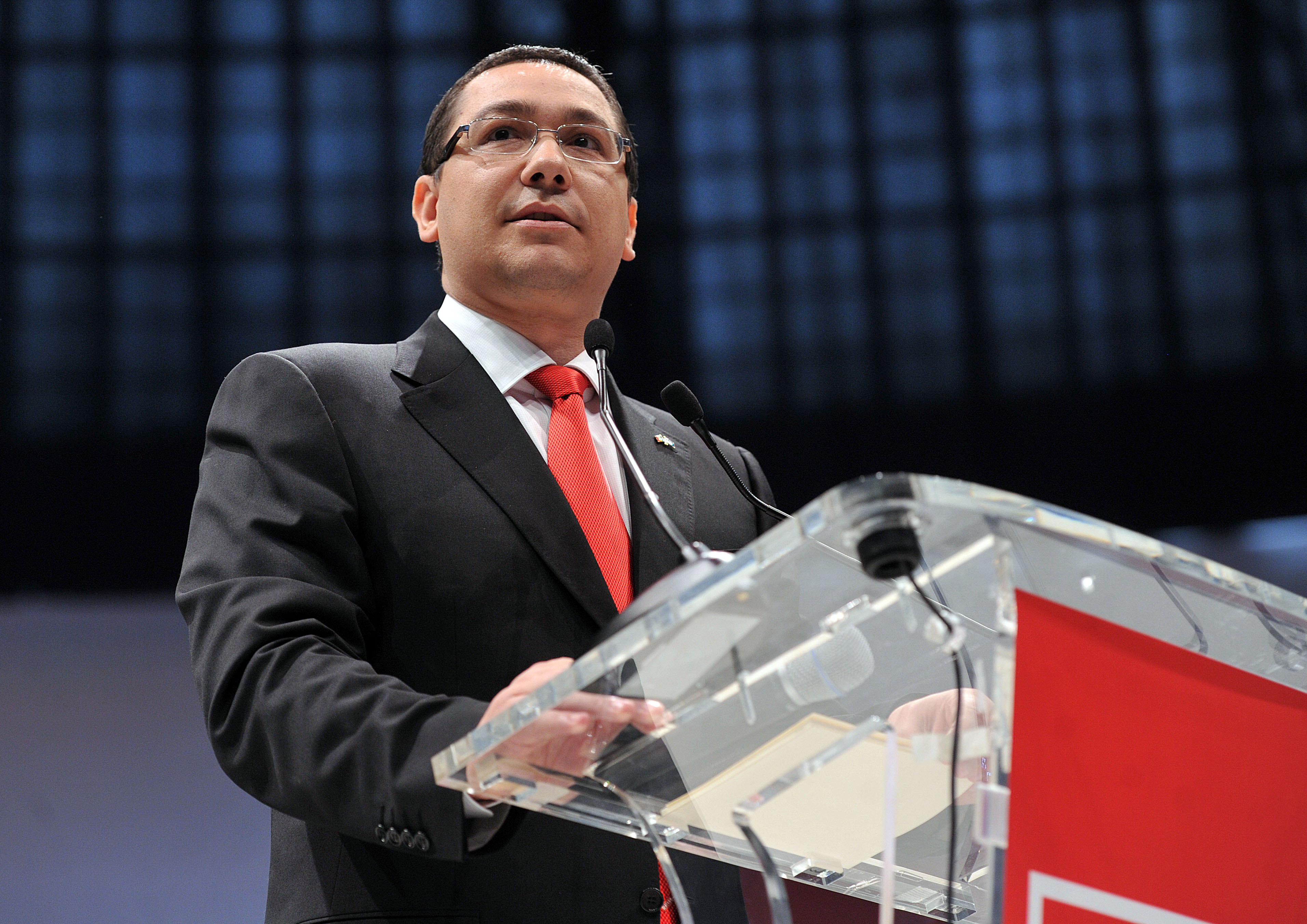 Lansarea candidatilor Aliantei PSD-UNPR-PC pentru alegerile europarlamentare (41)